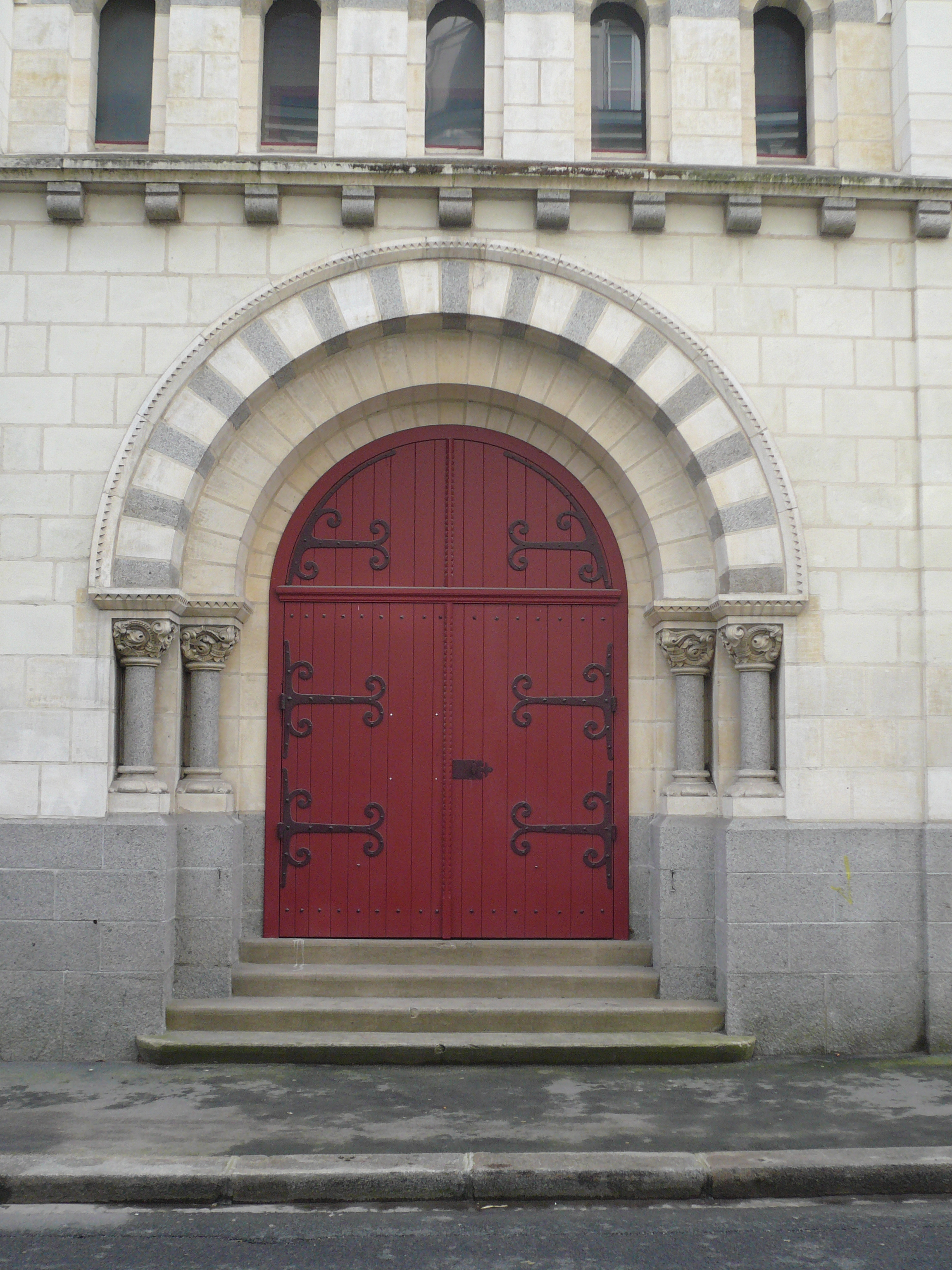 Porte d'une ancienne chapelle de la rue de Paris à Rennes, Bretagne, France.